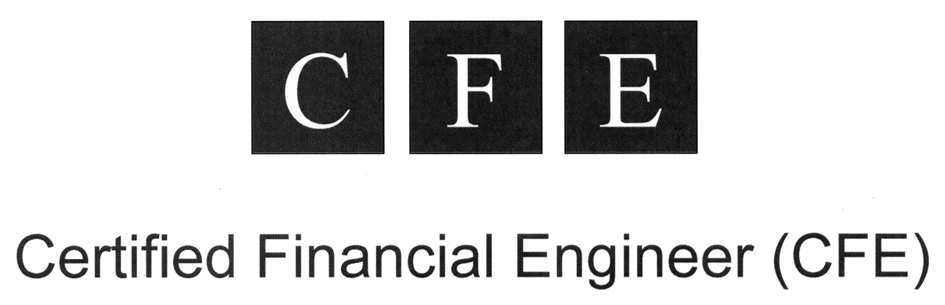 Logo von